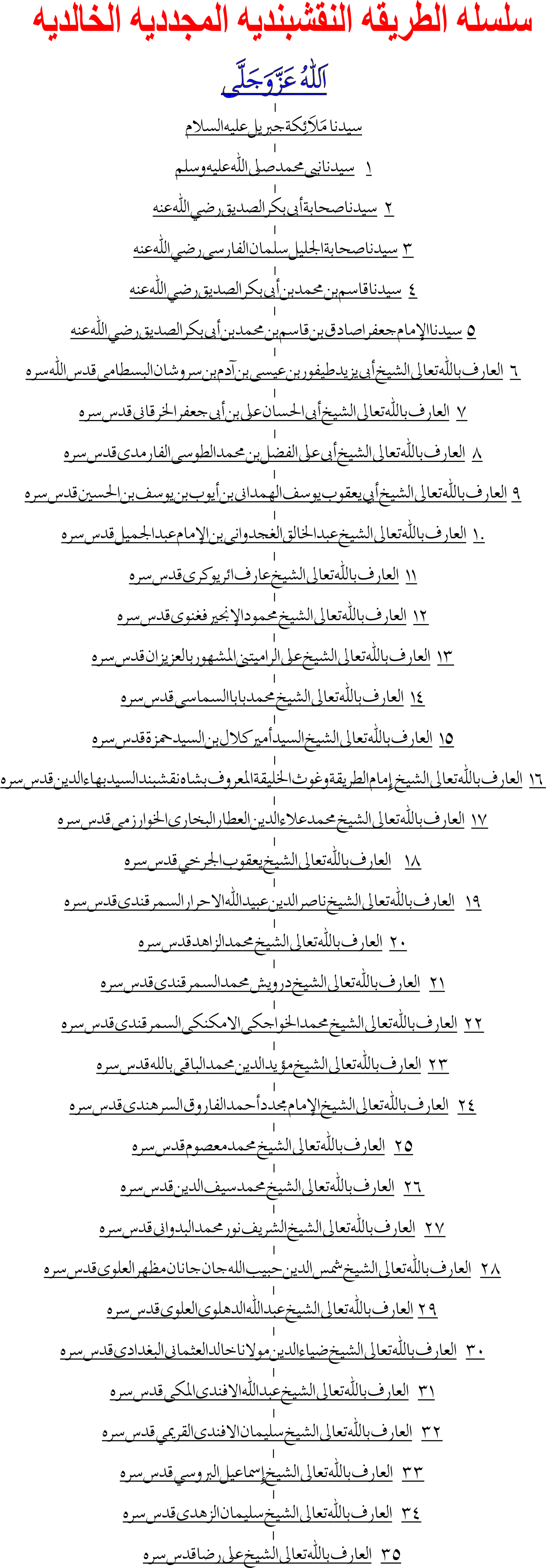 Silsilah Thoriqoh Naqsyabandiyah Mujaddadiyah Kholidiyah yang sesuai dengan kitab dan sanad